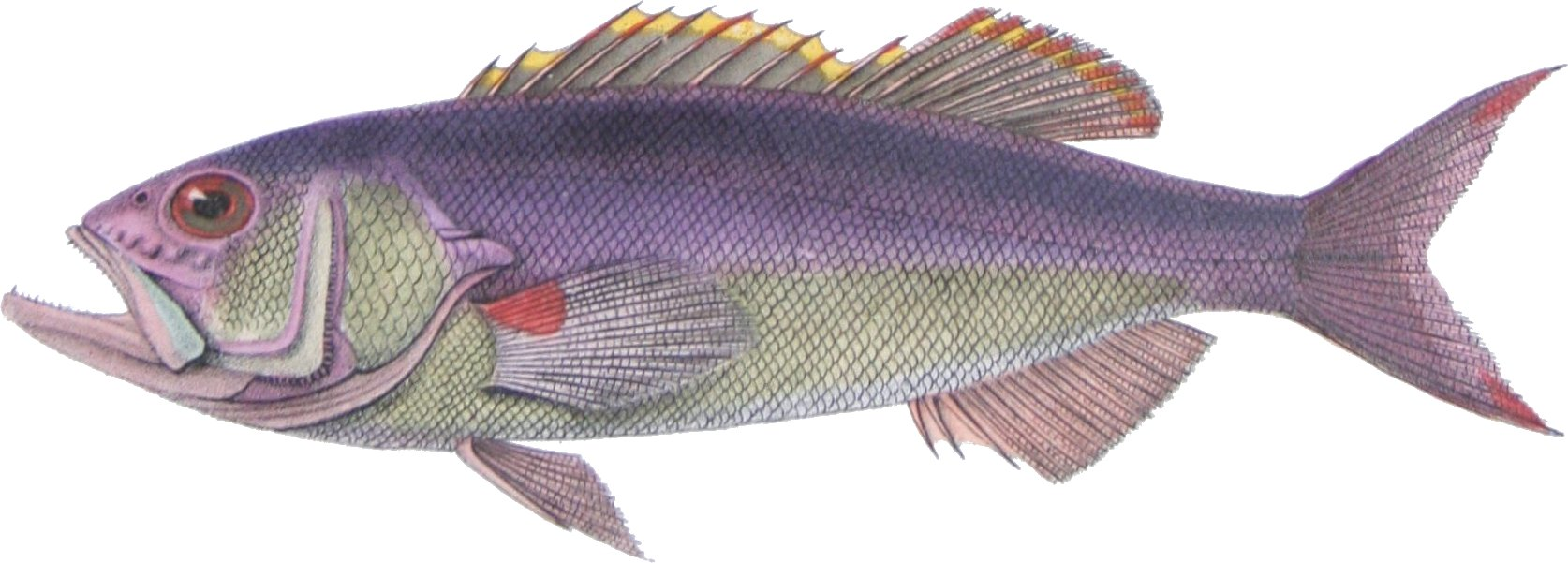 Centropristis nebulosus Cast. = Paranthias furcifer (Valenciennes, 1828)